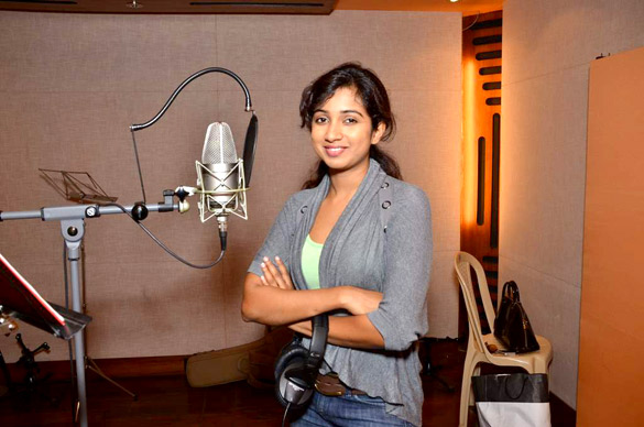 Shreya Ghoshal at Teen Kaniya song recording